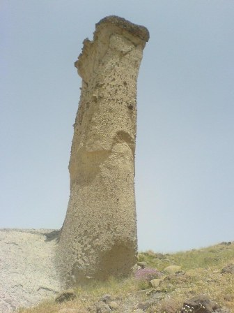 ستون سنگیه طبیعی(ميل قَيه سي) در دامنه های بخش یامچی-روستای ینگجه